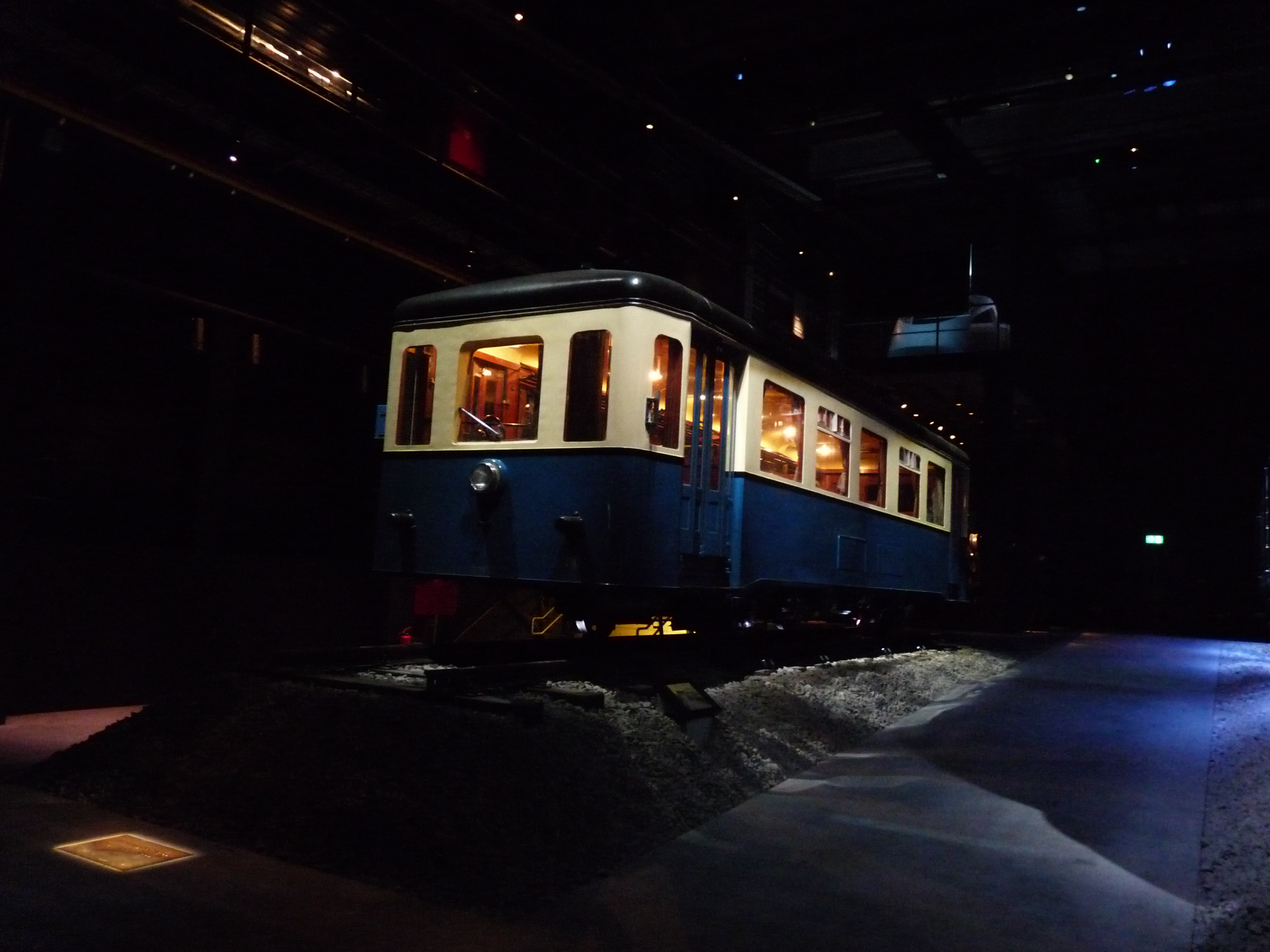 Vroegere autorail